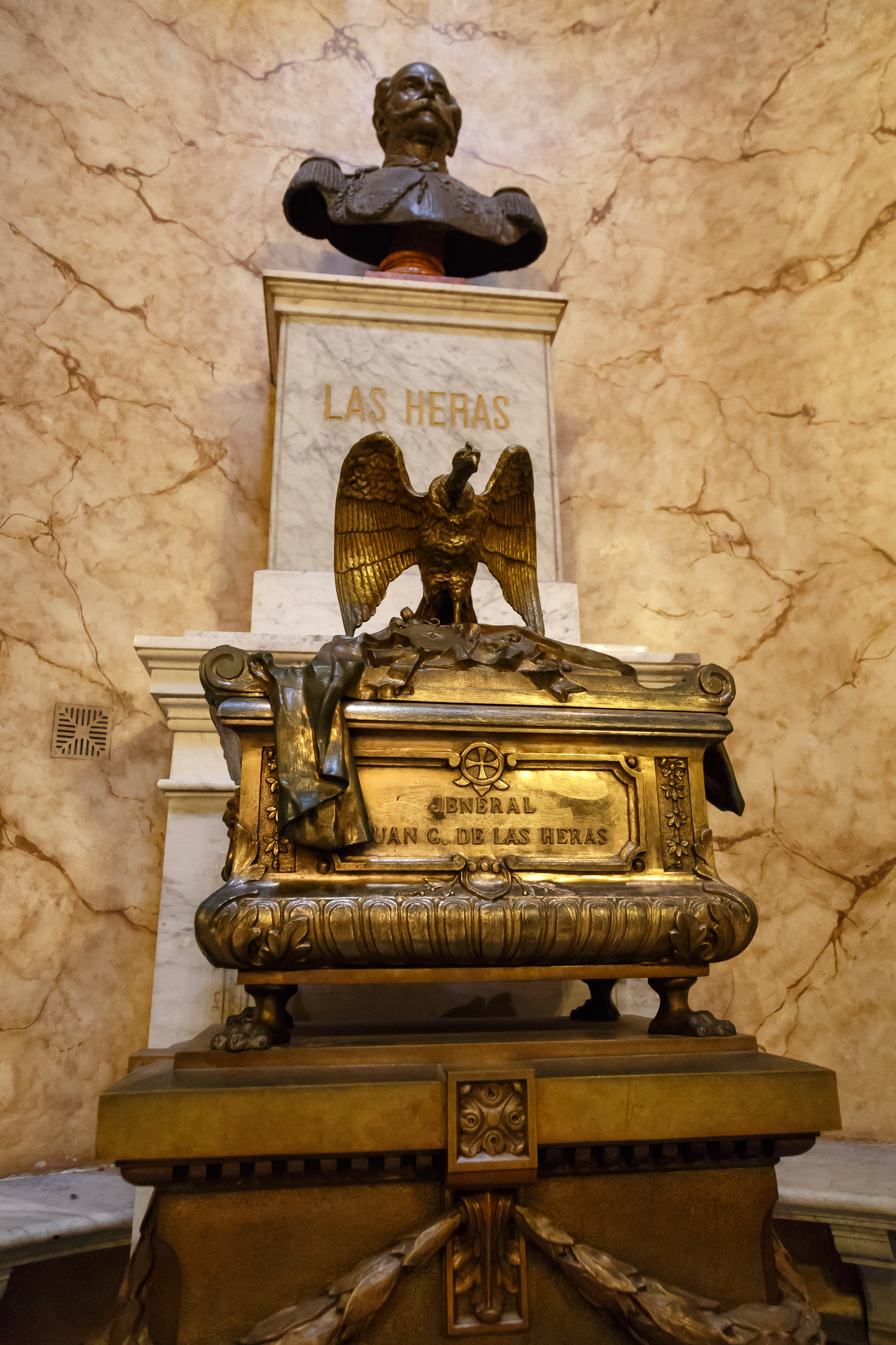 Interior de la Catedral Metropolitana de Buenos Aires. Mausoleo del General San Martín. Urna con los restos del General Las Heras.